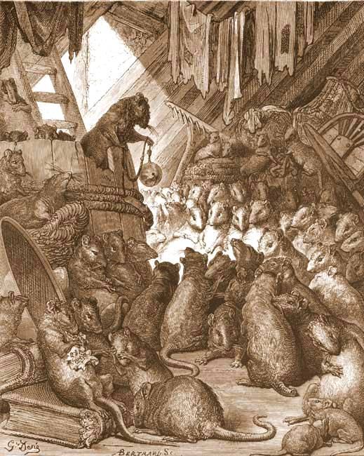 illustration for Jean de La Fontaines fables by Gustave Doré